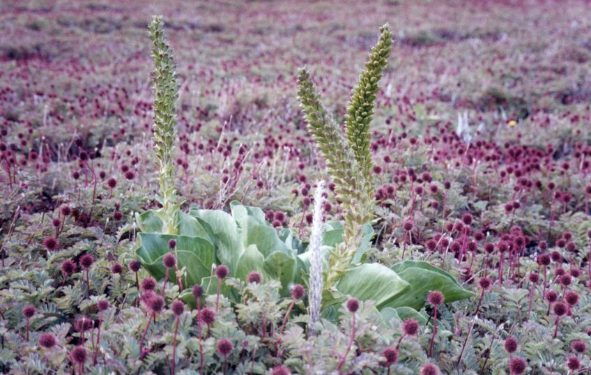 Choux de Kerguelen au milieu d'un champ d'acaena. Photo prise en 1997, lors de l'hivernage de la 47eme mission à Kerguelen.